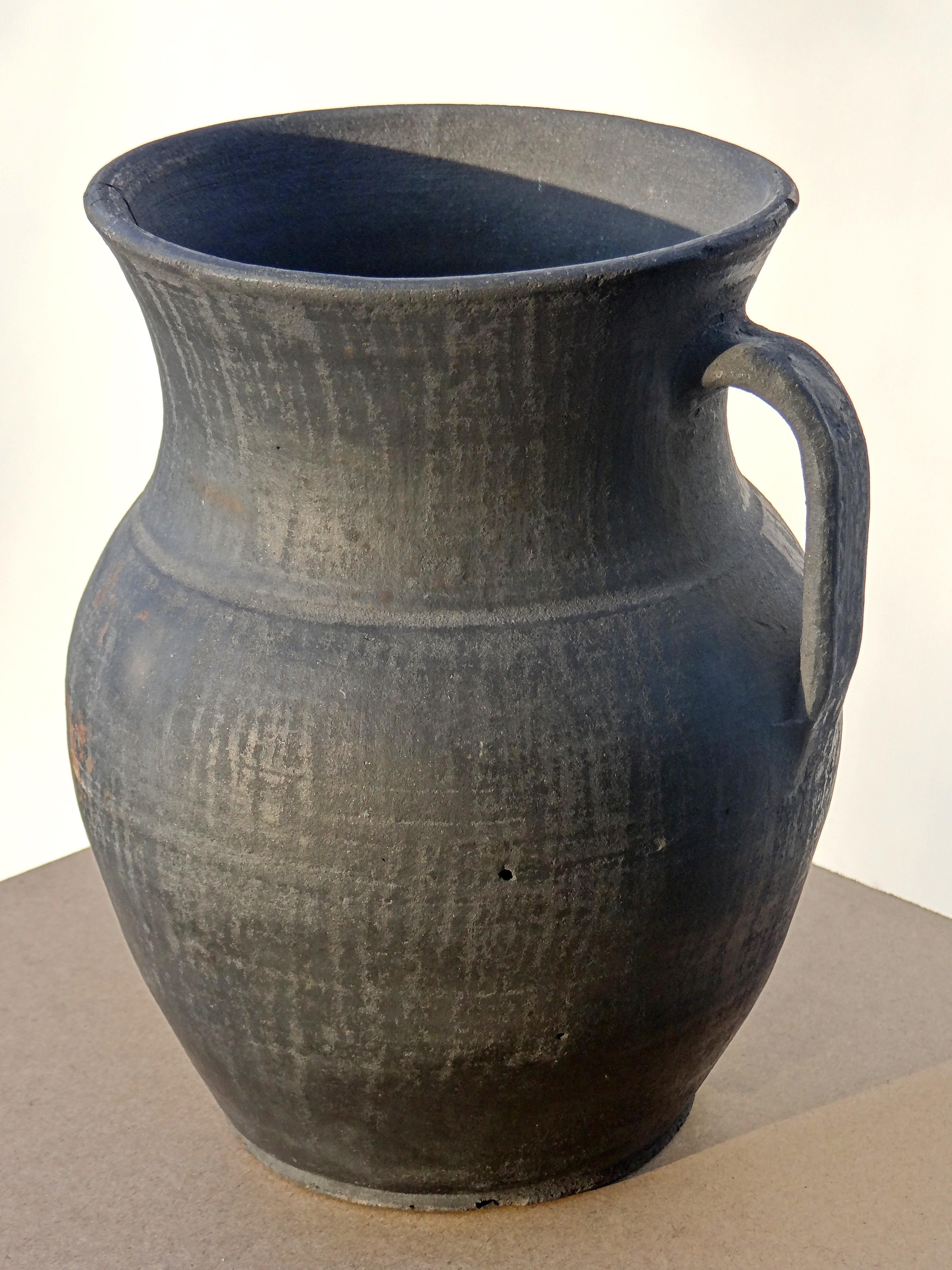 Siwak dzban. Pochodzenie zachodnia Ukraina nabytek z pocz. lat 80. XX w.